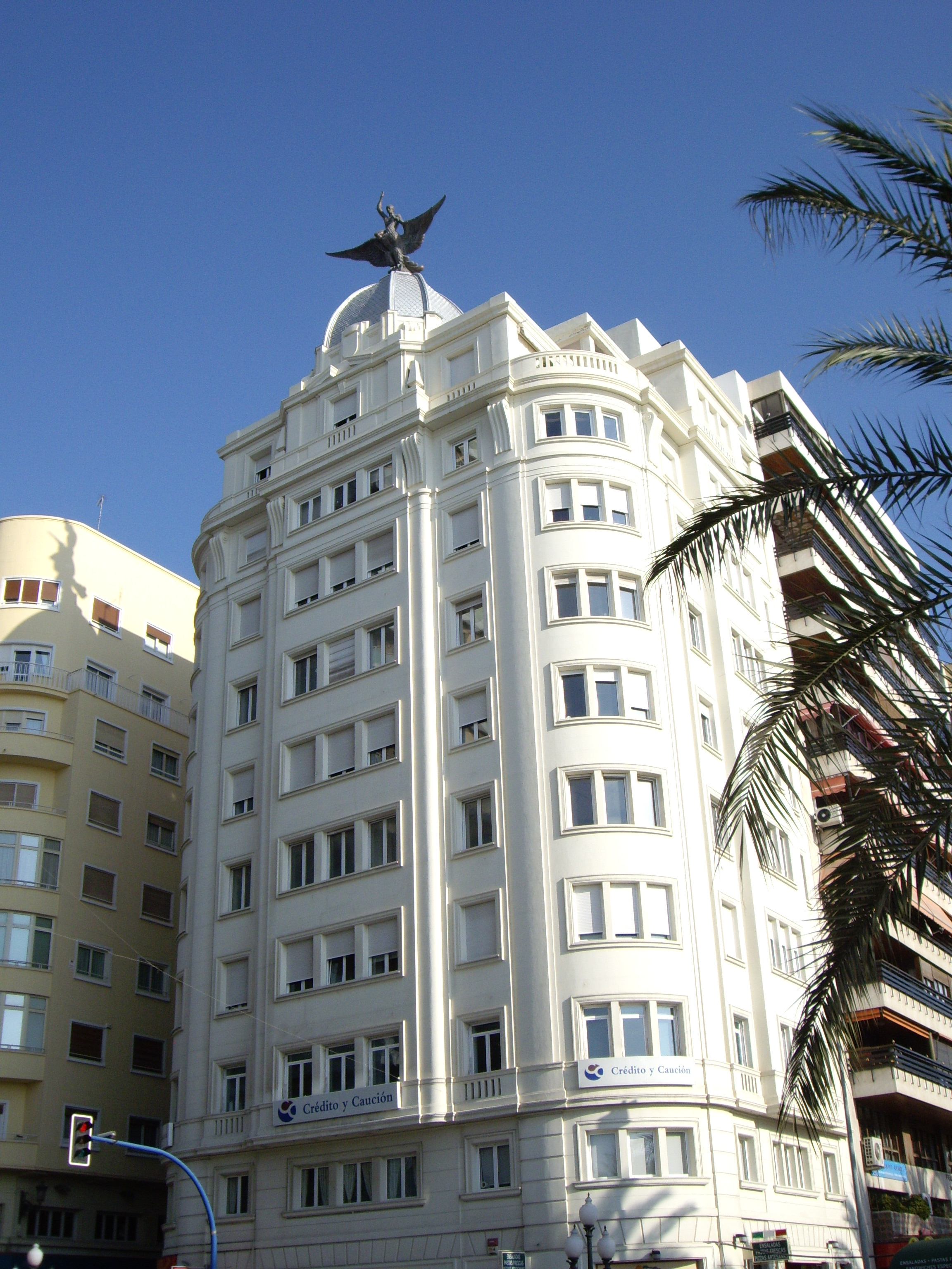 Fènix a Alacant.